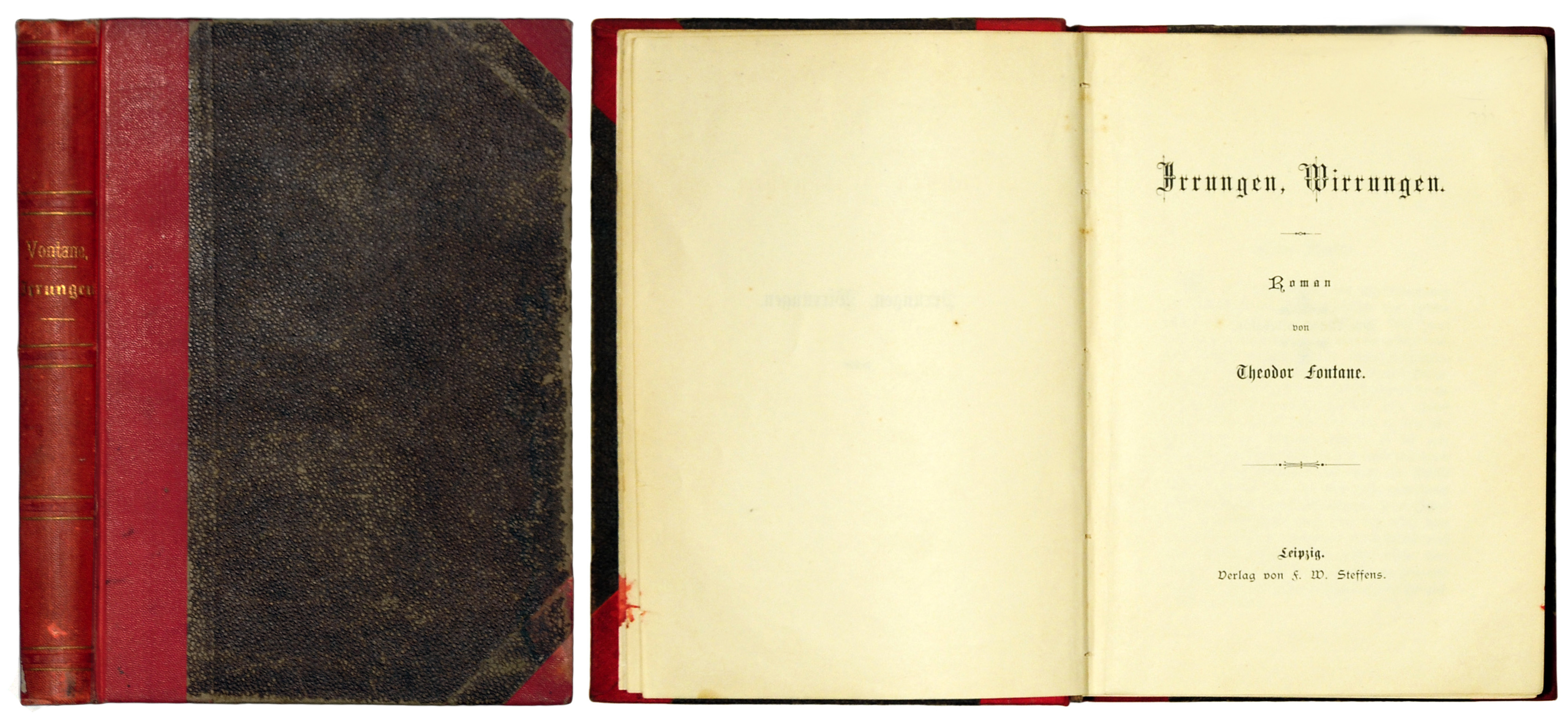 Fontane, Theodor: Irrungen, Wirrungen. Roman. Leipzig: Verlag von F. W. Steffens, o. J. [1888], 284 S., Erstausgabe